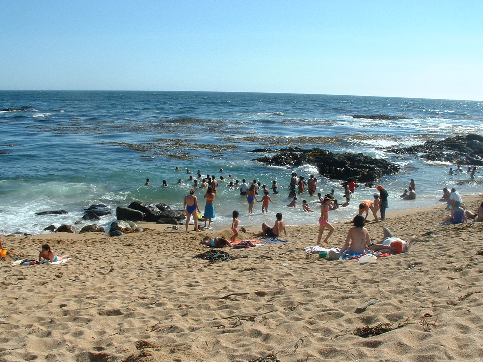 Playa en El Tabo, Chile